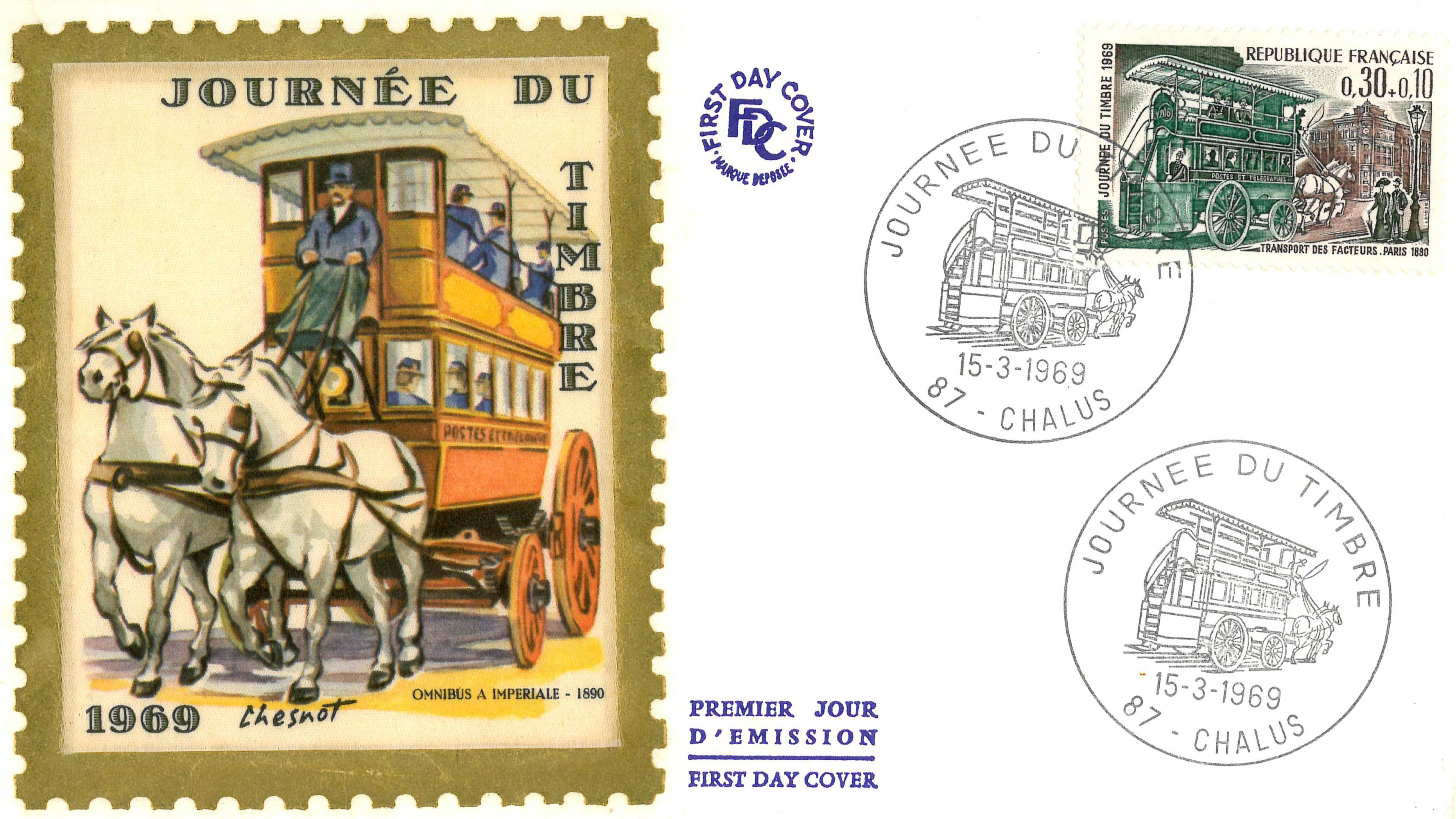 Enveloppe 1er jour de la journée du timbre à Châlus le 15 mars 1969